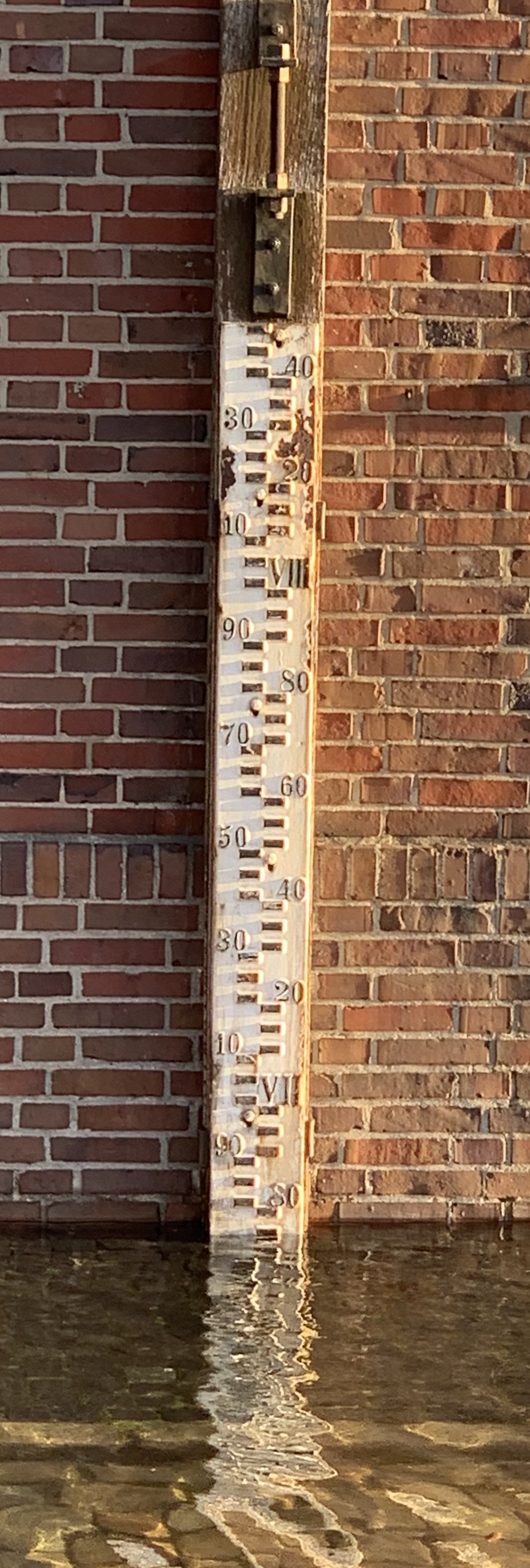 In Kiel, in der Straße Wall ein Pegel an diesem Gebäude